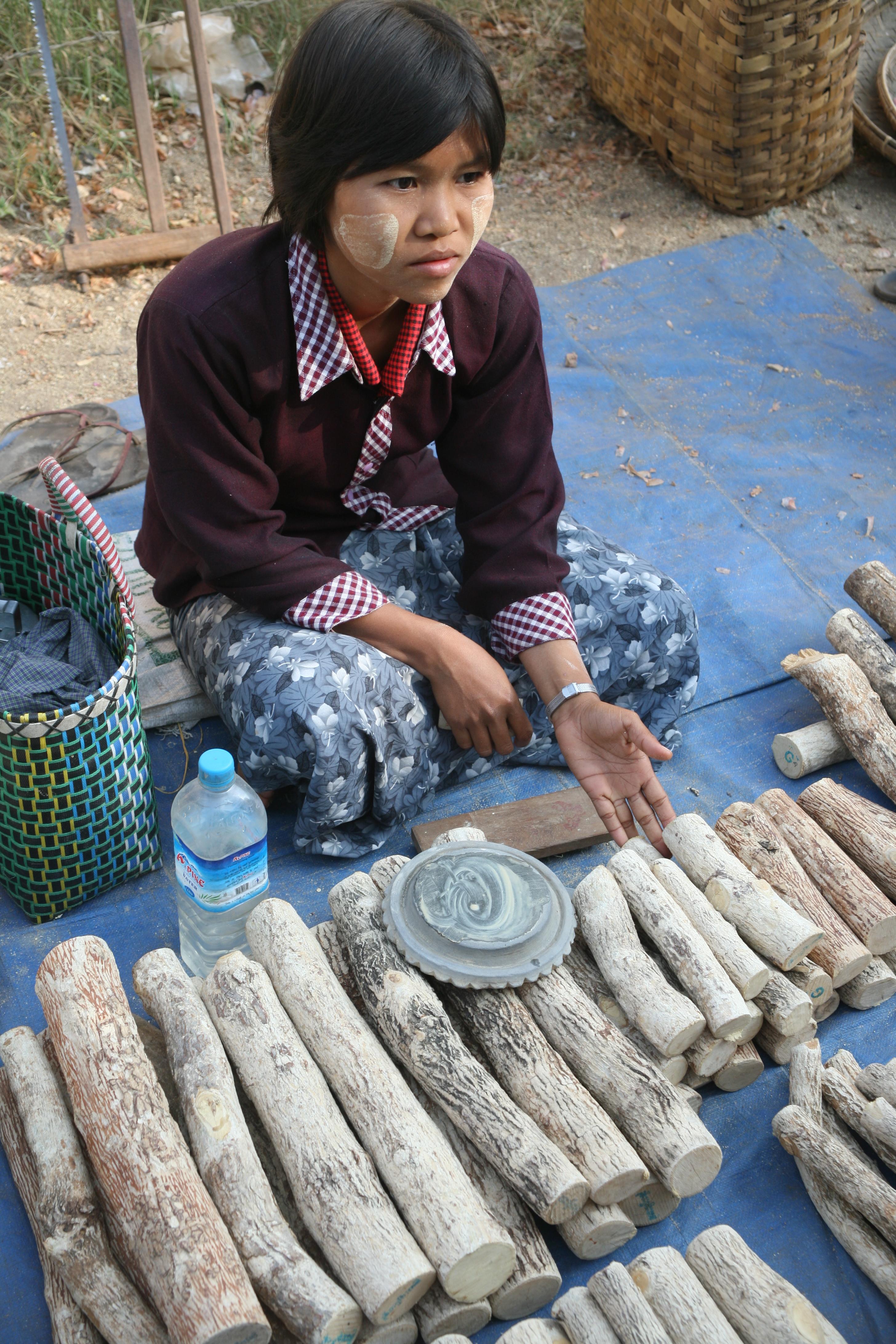 Vente de thanaka sur un marché en Birmanie